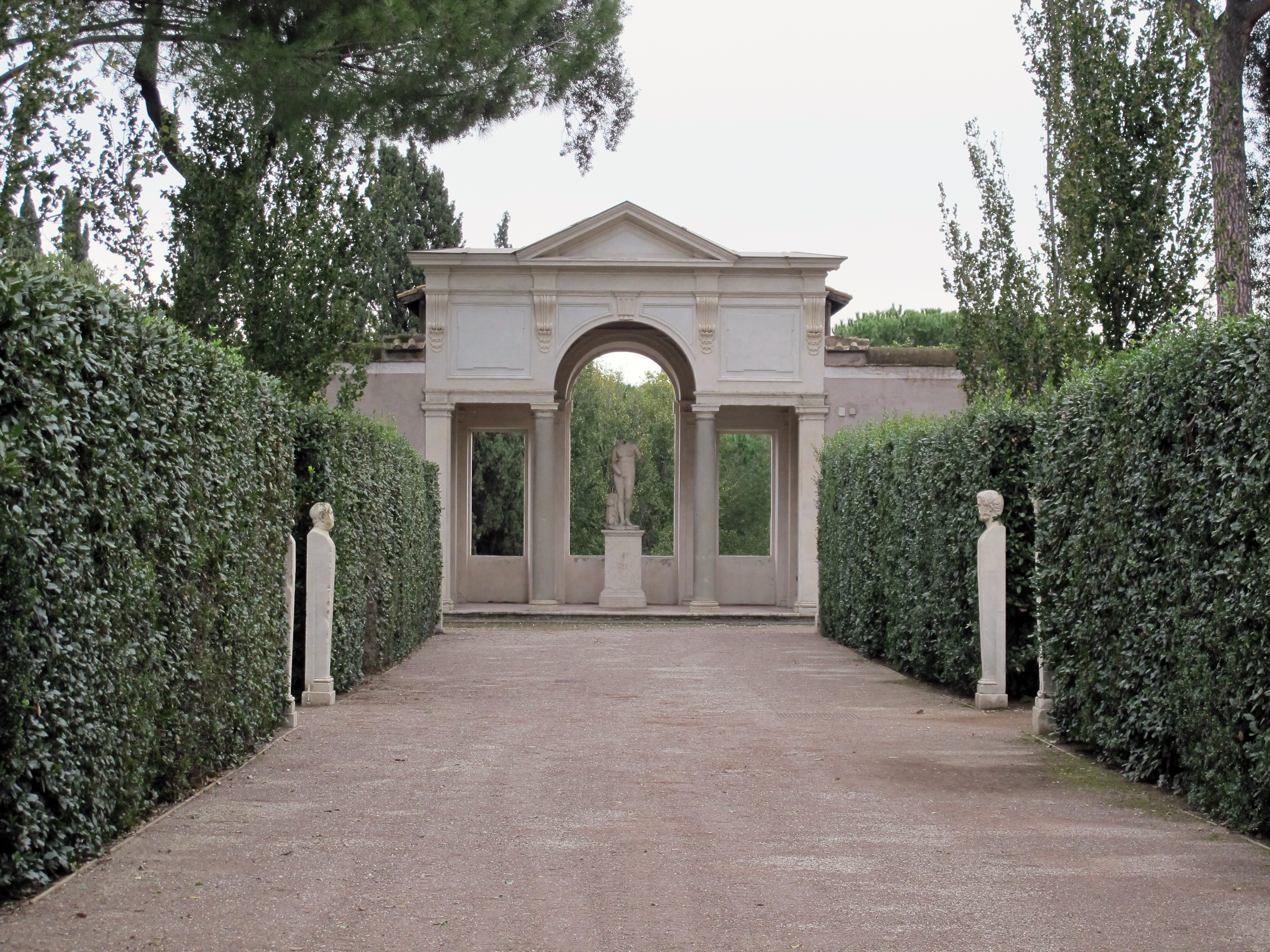 Villa Medici, Roma